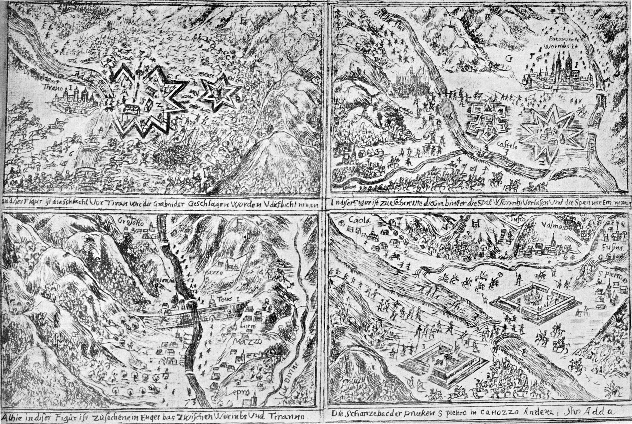 Skizzen zu den Feldzügen der Bündner unter Herzog Rohan im Veltlin 1635. Bild 1: Die Schlacht vor Tirano, in der die Bündner geschlagen wurden. Bild 2: Die Bündner verlassen die Stadt Worms (Bormio) und die Spanier nehmen sie ein. Bild 3: Der befestigte Engpass zwischen Bormio und Tirano bei Mazzo. Bild 4: Die Schanzen bei der Adda-Brücke von San Pietro.